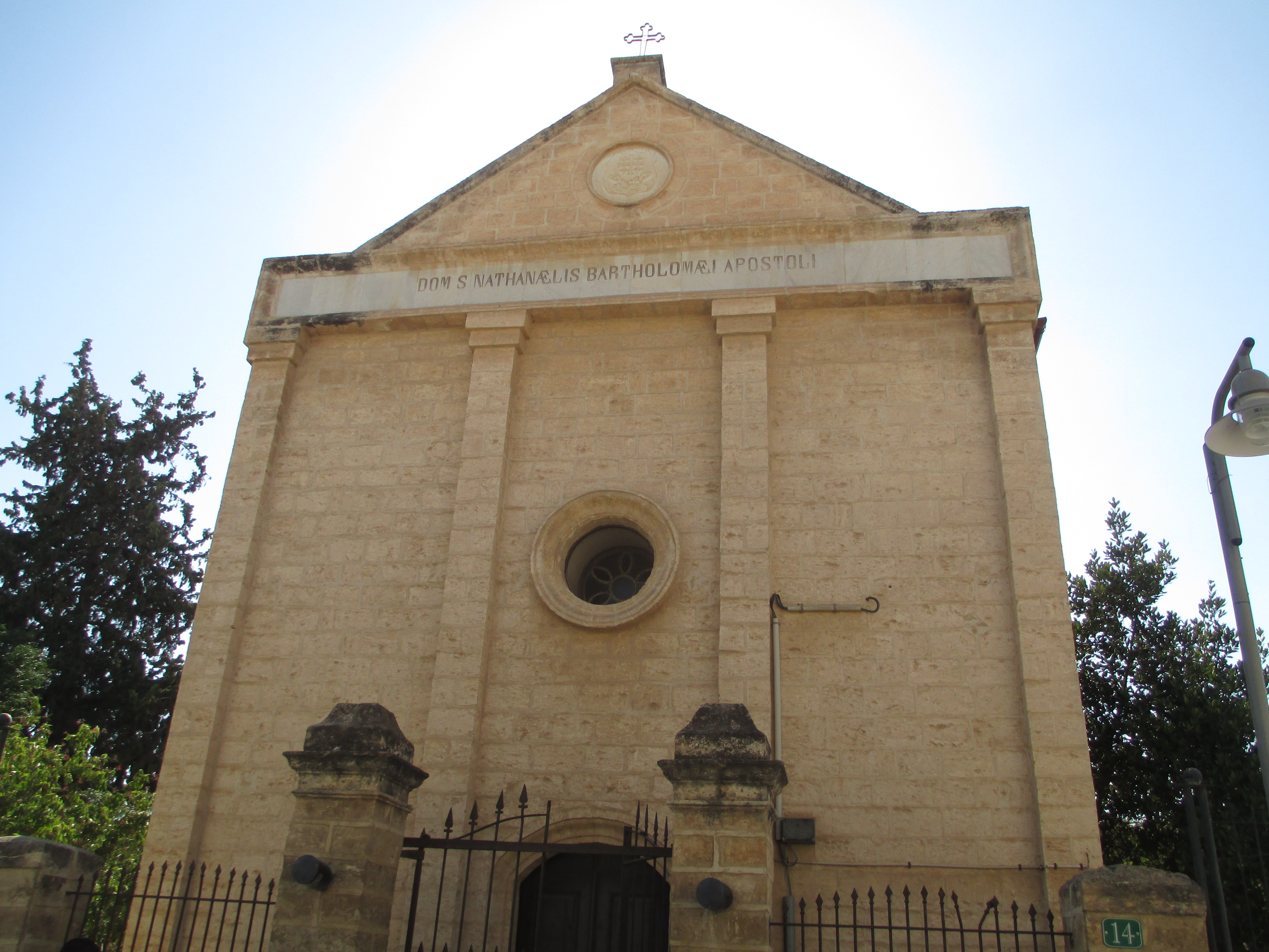 כנסיית בית ברתולומאוס השליח בכפר כנא